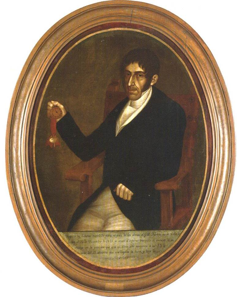 Tableau dont la paternité est attribuée à Pedro José Figueroa : "Antonio Nariño al momento de su muerte" (1838)